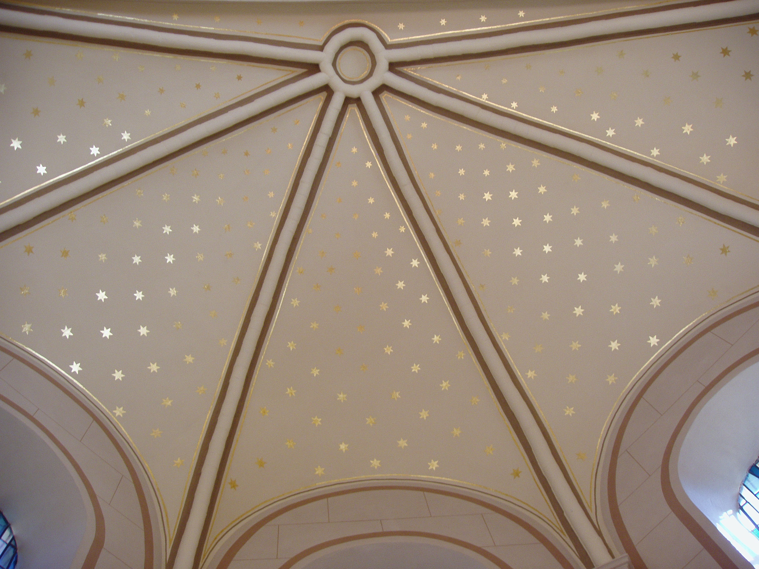 Evangelische Dorfkirche Glienicke/Nordbahn: Das Gewölbe der Apsis mit dem Sternenhimmel (Aufnahme 2014)